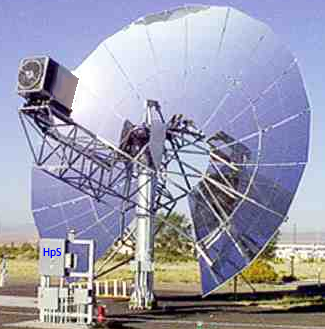 Dish/Stirling System von SOLO Motoren in der Forschungsanlage Almeria Spanien